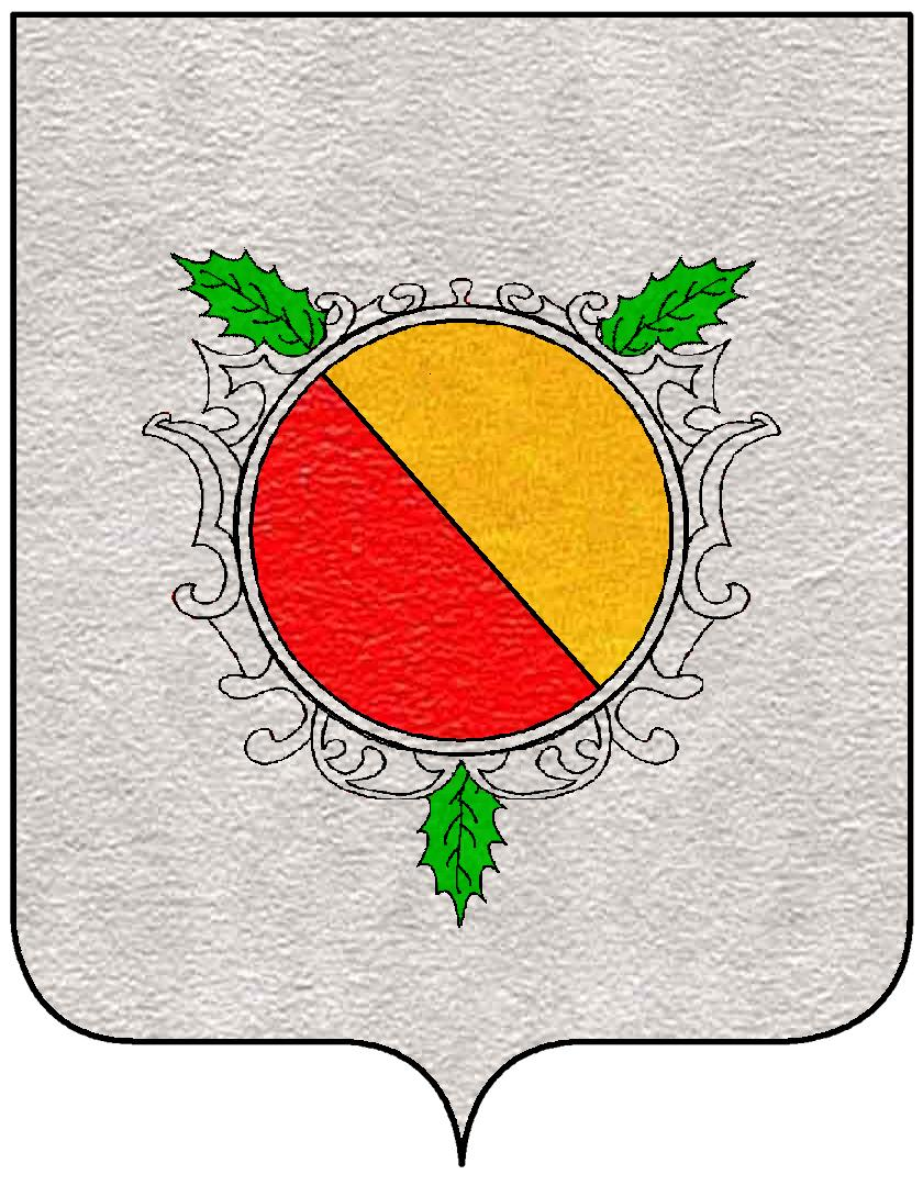 Stemma della famiglia Nani